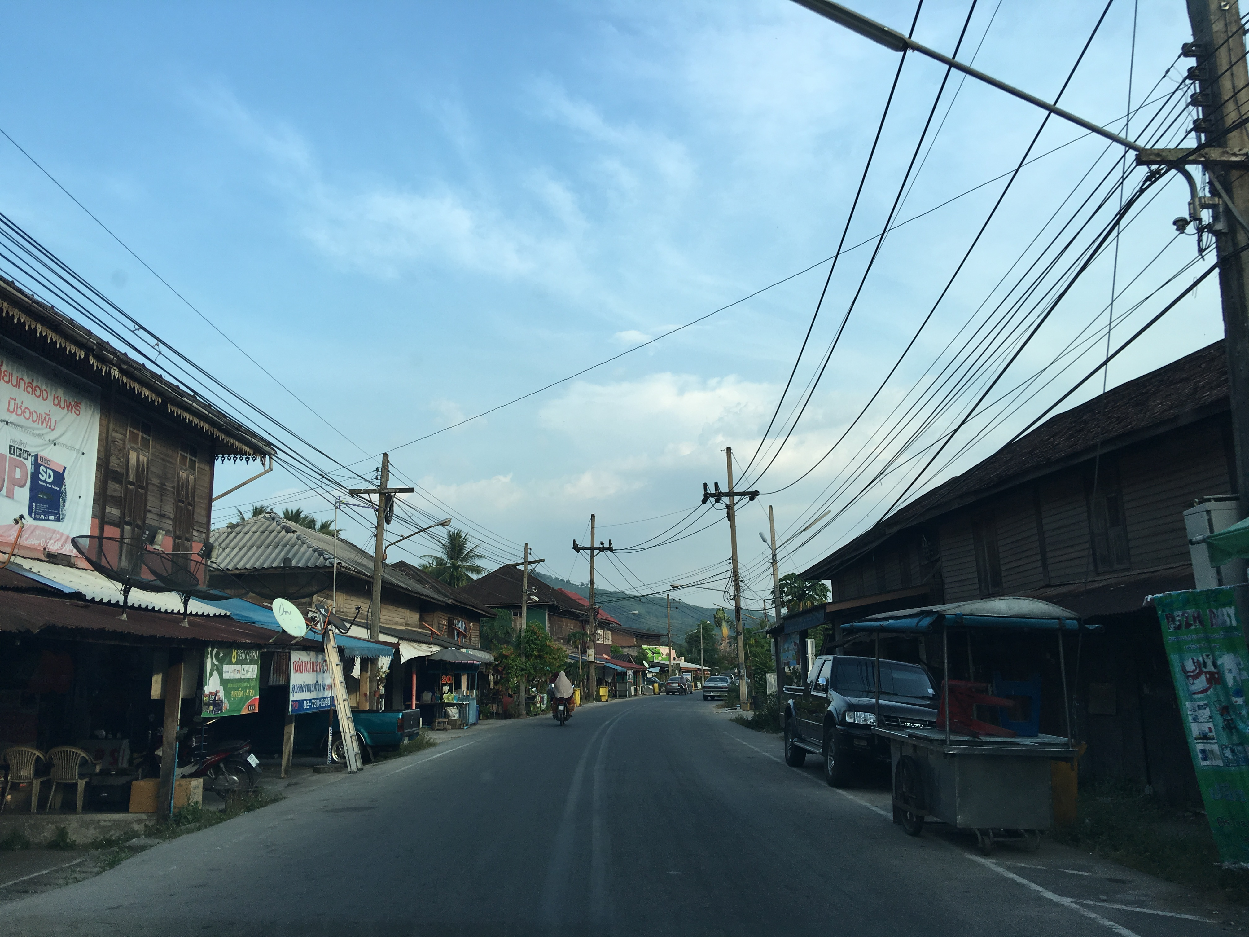 Mayo, Mayo District, Pattani 94140, Thailand